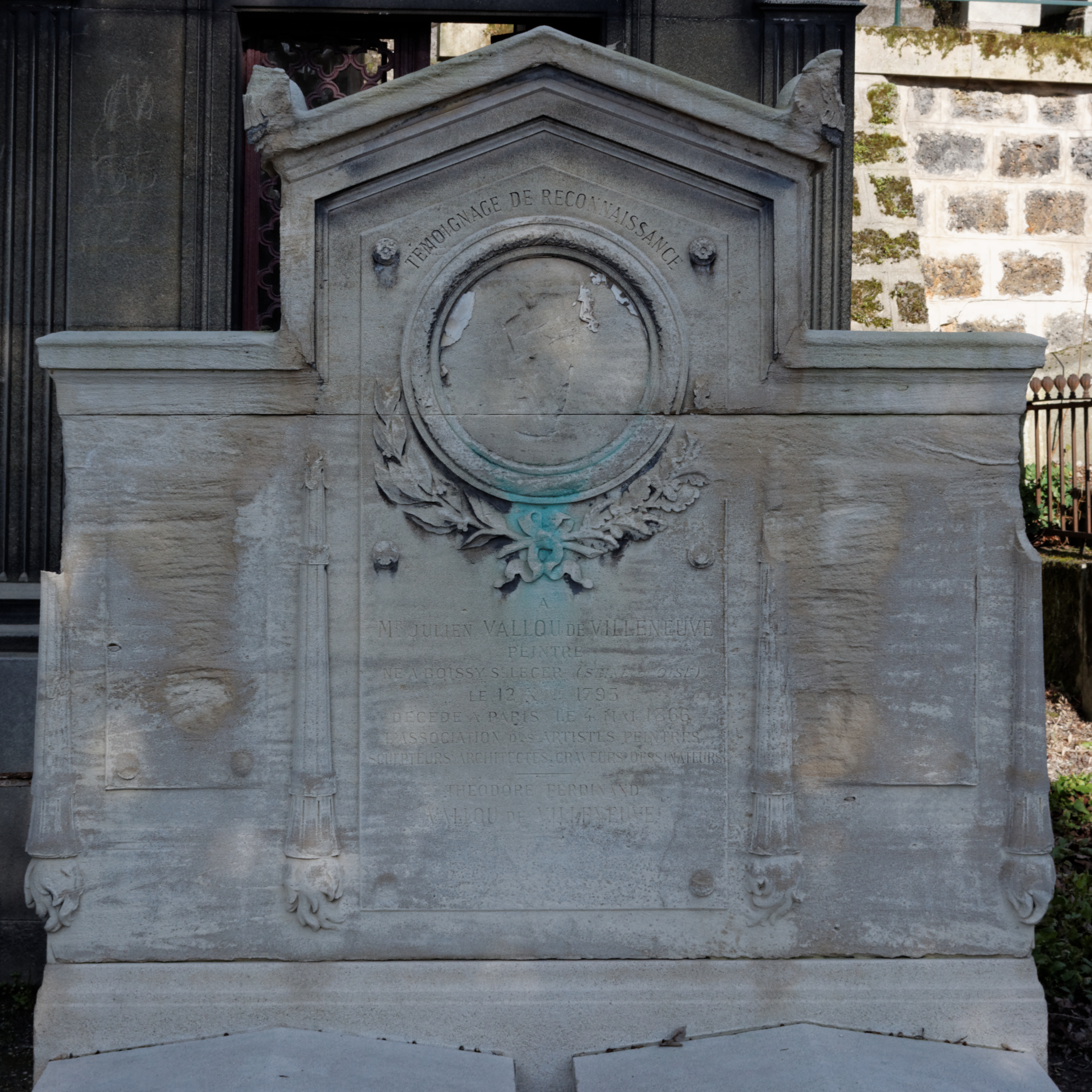 Sépulture de Julien Vallou de Villeneuve (1795-1866), peintre ; et son frère Théodore-Ferdinand Vallou de Villeneuve (1801-1858), auteur dramatique.